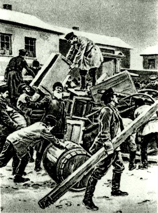 Строительство баррикад на Васильевском острове 9 января 1905 года. Рисунок неизвестного художника.